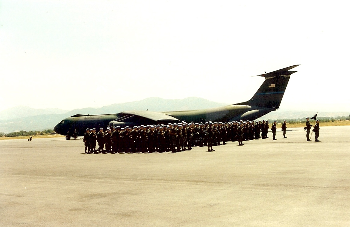 US soldiers wearing the blue UN barret arriving in Skopje, FYR Macedonia July 12th 1993 Amerikanske FN soldater ankommer Skopje i FYR Macedonia